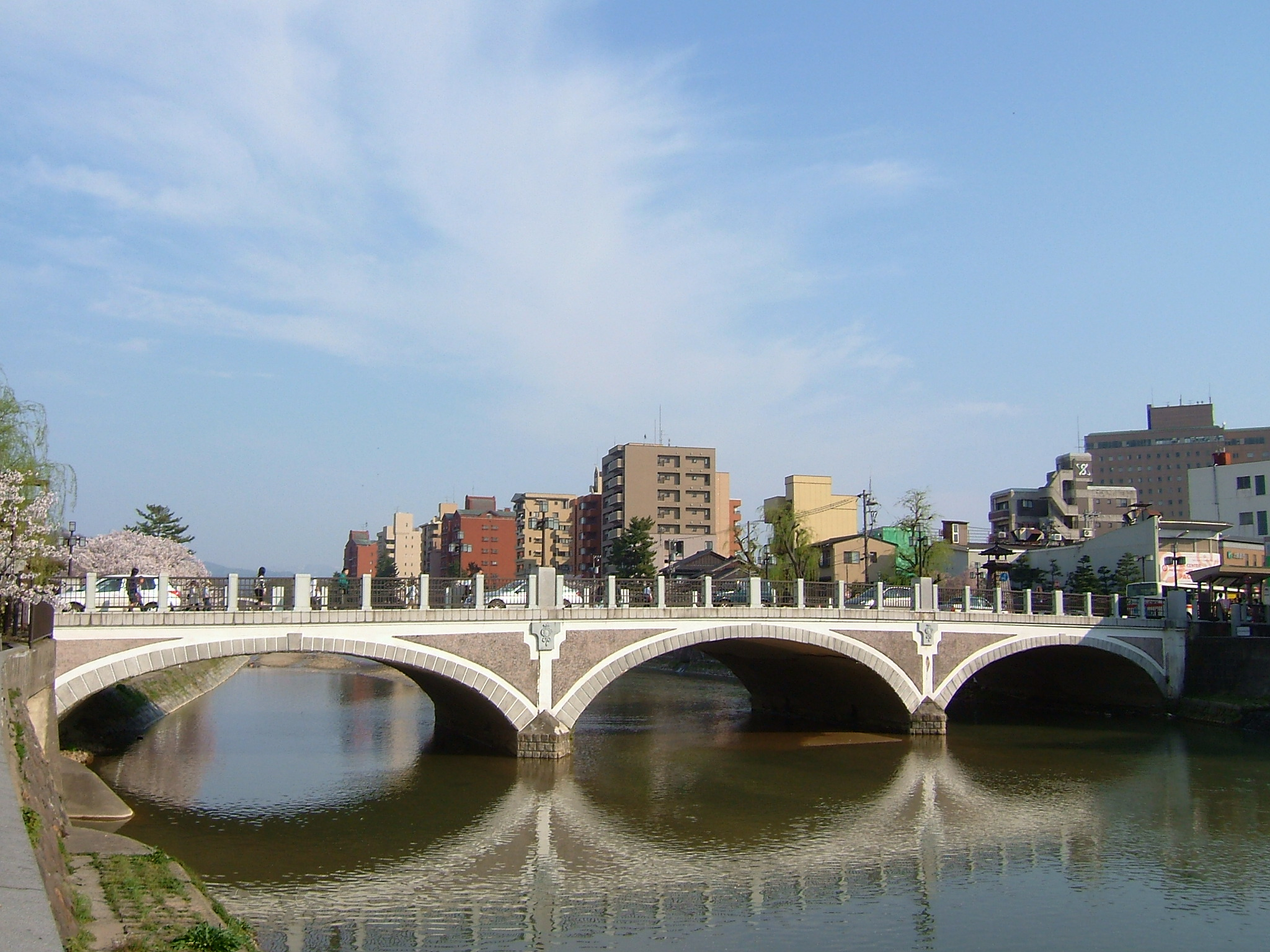 石川県金沢市にある浅野川大橋。周辺にはひがし茶屋街などの花街がある。